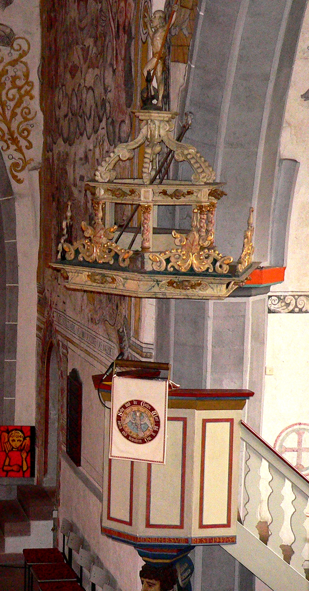 Evangelische Kirche St. Laurentius in Dassel, Niedersachsen, Deutschland - Kanzel